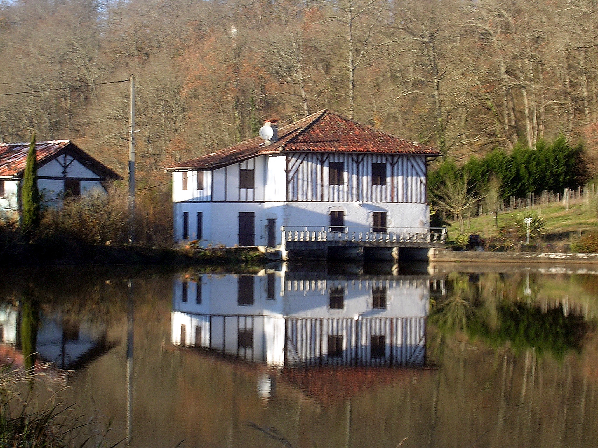 Moulin à eau de Duhort-Bachen (Landes, France)